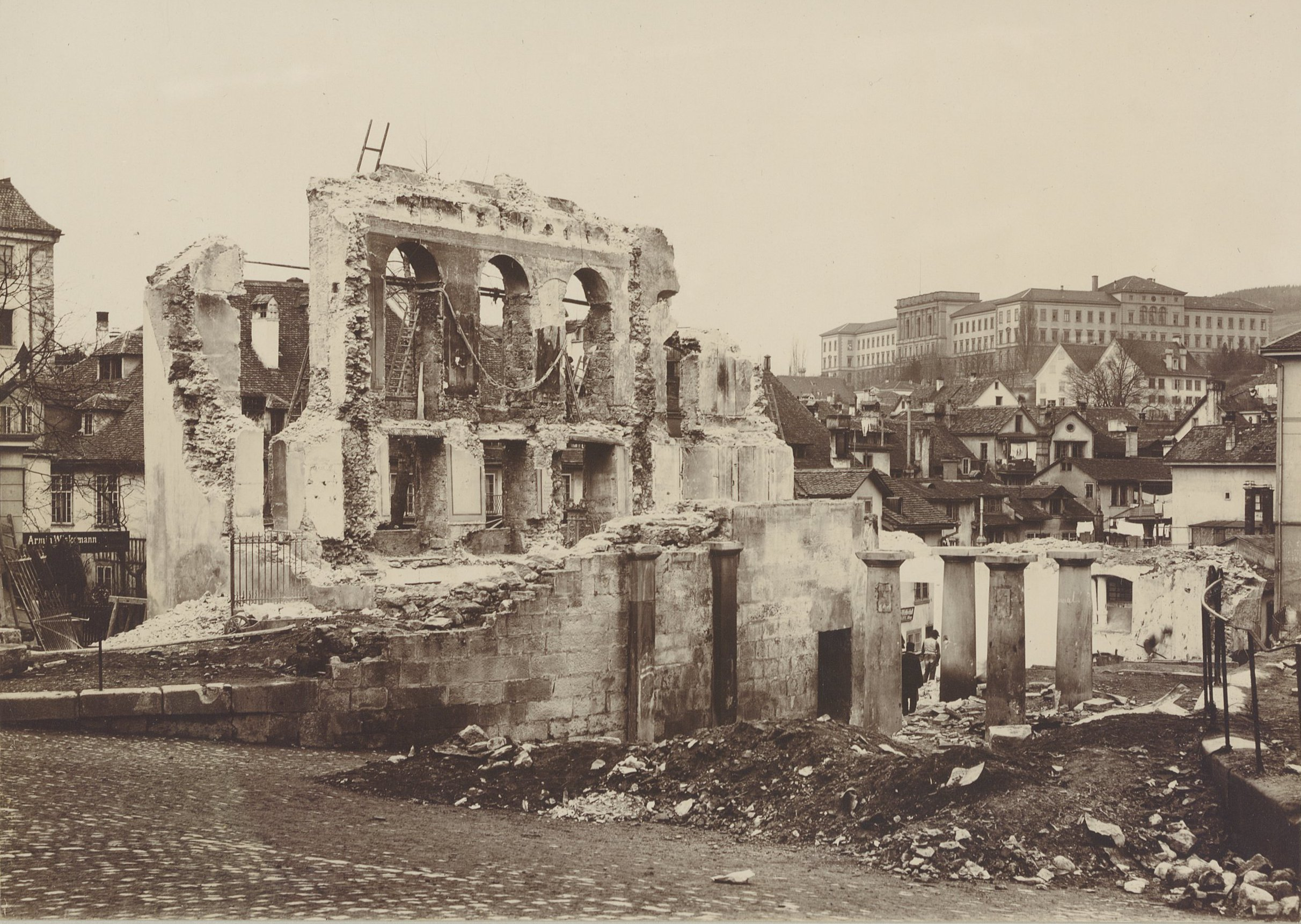 [Nach dem Brand im Aktientheater Zürich, Nördlich von der Strasse]